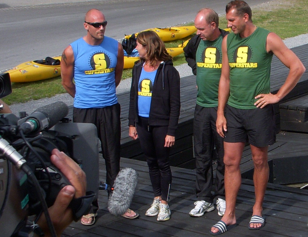 Thomas Ravelli och Magnus Wislander (till höger i bild) båda i grön tröja samt Henrik Nilsson och Magdalena Forsberg (i blå tröja) vid inspelning av TV3:s "Superstars" på Skeppsholmen, Stockholm